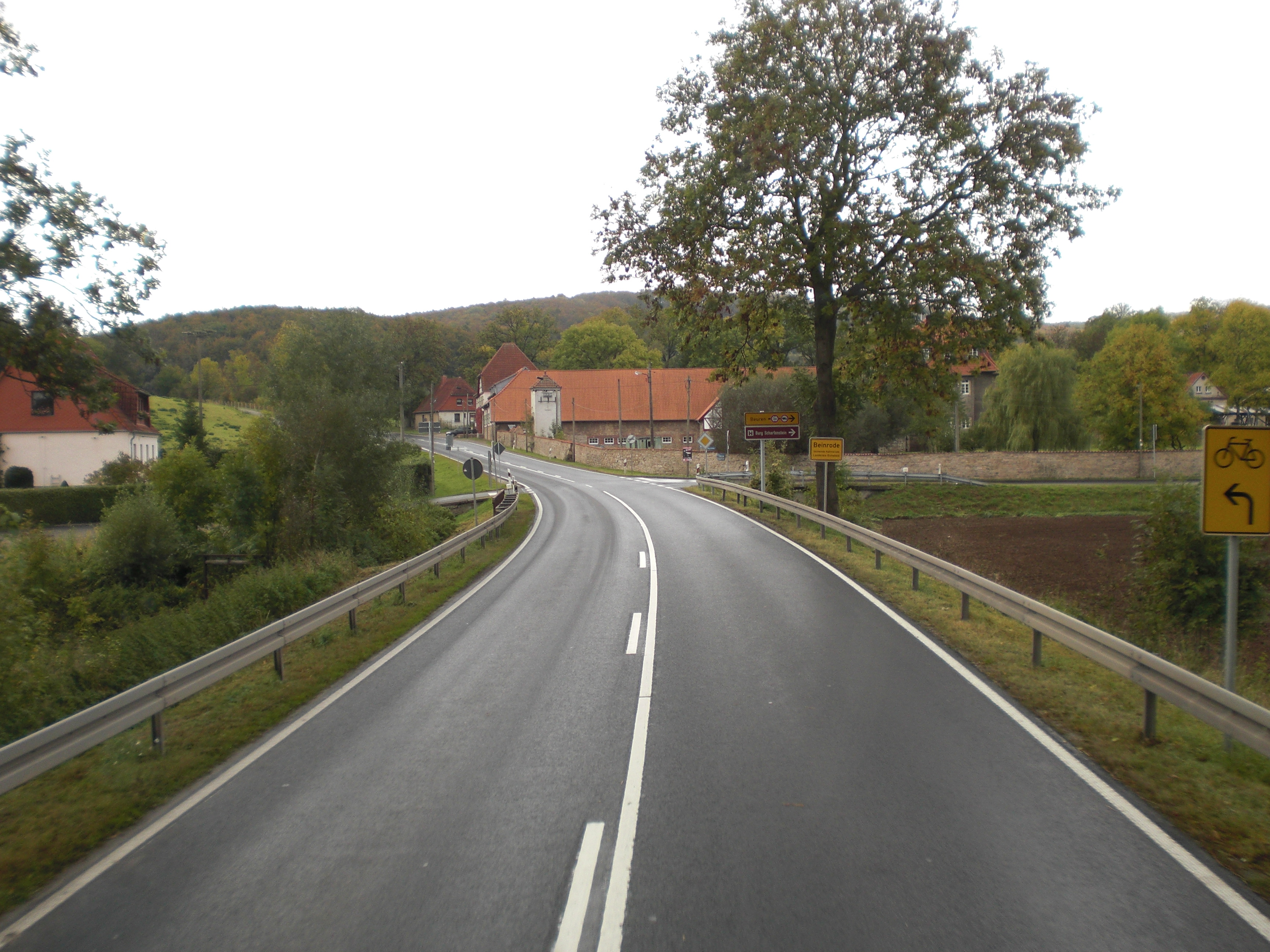 Beinrode Ortseingang Kallmeröder Straße B247